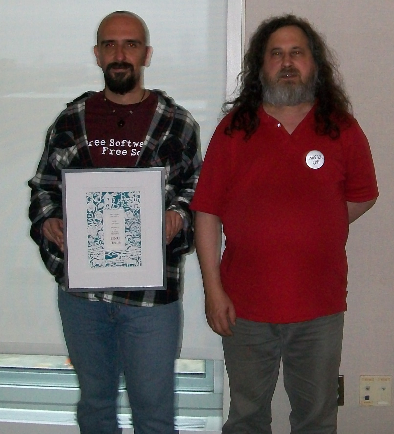 Luis Falcon et Richard Stallman lors de la cérémonie pour la remise des prix du logiciel libre 2011 à Boston en mars 2012 (le projet GNU Health, dont Luis Falcon est le mainteneur, s'est vu récompensé du prix pour les projets d'intérêt social)